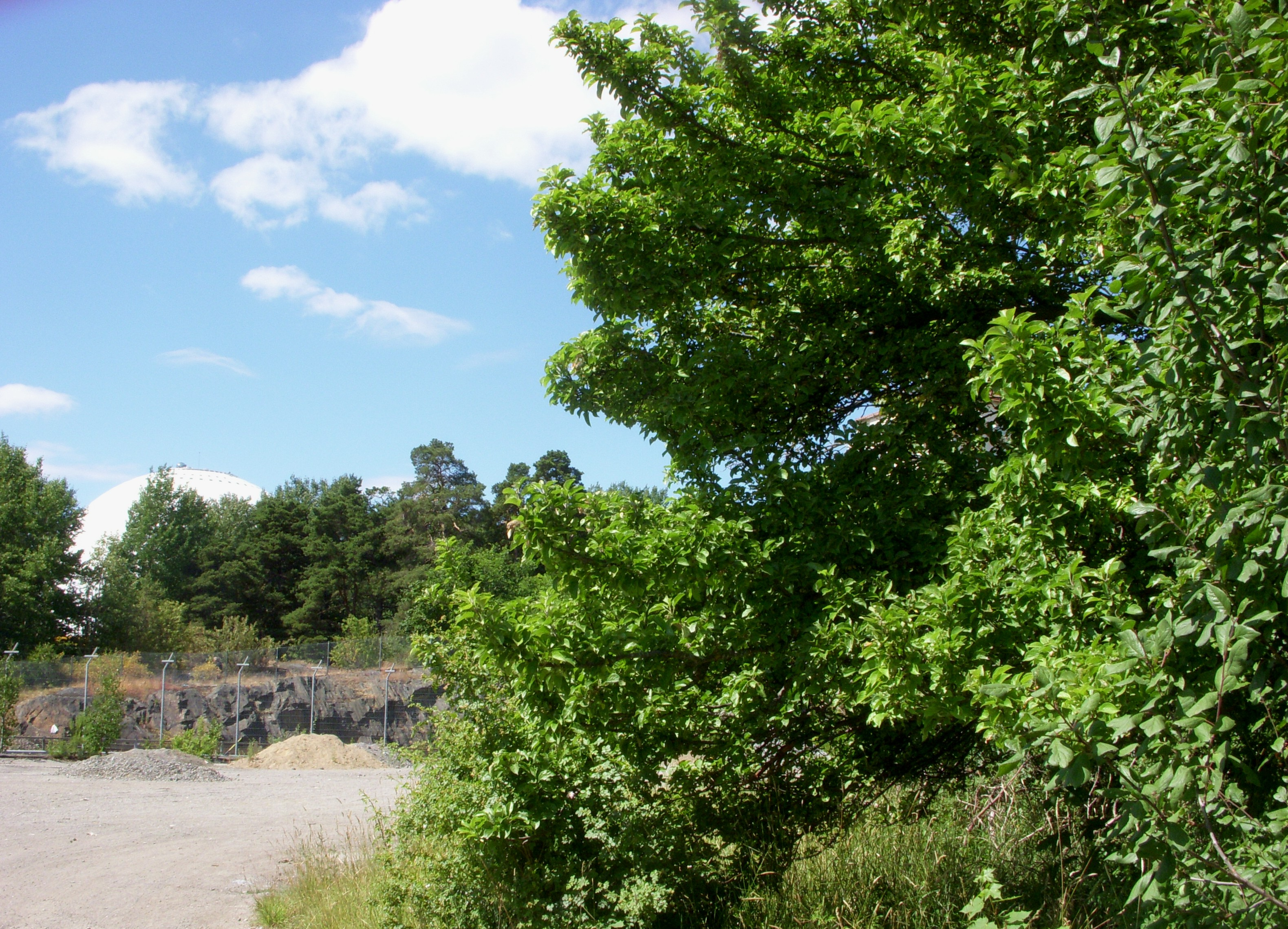 Sista resterna av Björkens koloniområde i Hammarbyhöjden